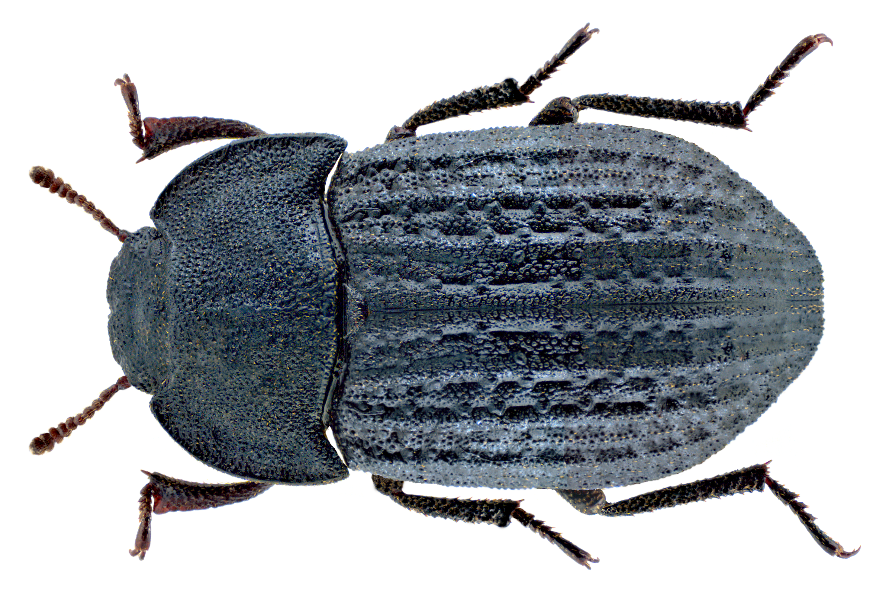 Family: Tenebrionide Size: 10,0 mm Location: Montenegro, Sutomore leg.det. U.Schmidt, VI.1982 Photo: U.Schmidt, 2013